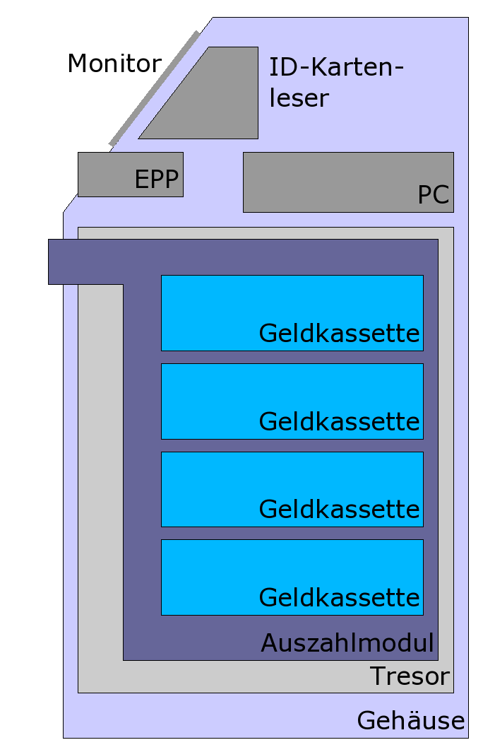 Schnitt durch einen Geldautomaten Zeichner: Werner Roth